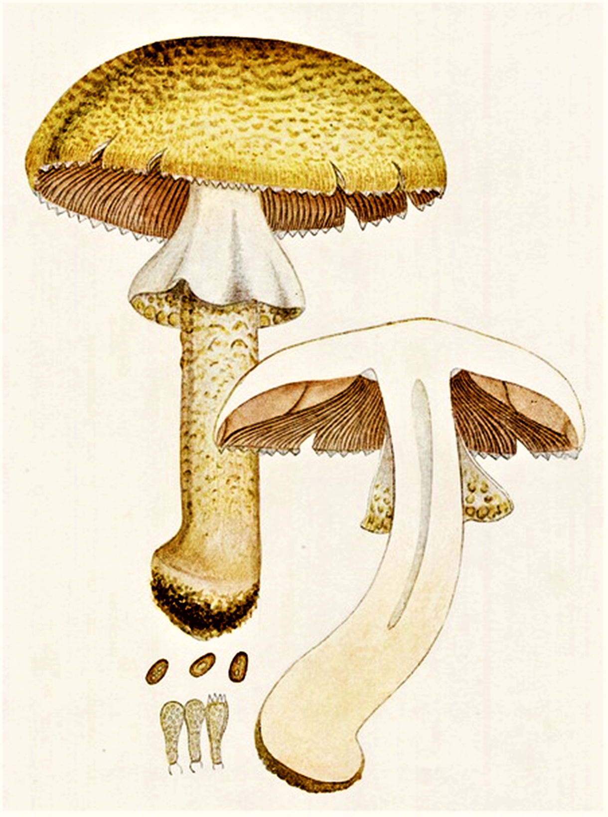 Bres.: Psalliota perrara (Schulzer, 1879) Bres. (1887) heute Agaricus augustus Fr. (1838)